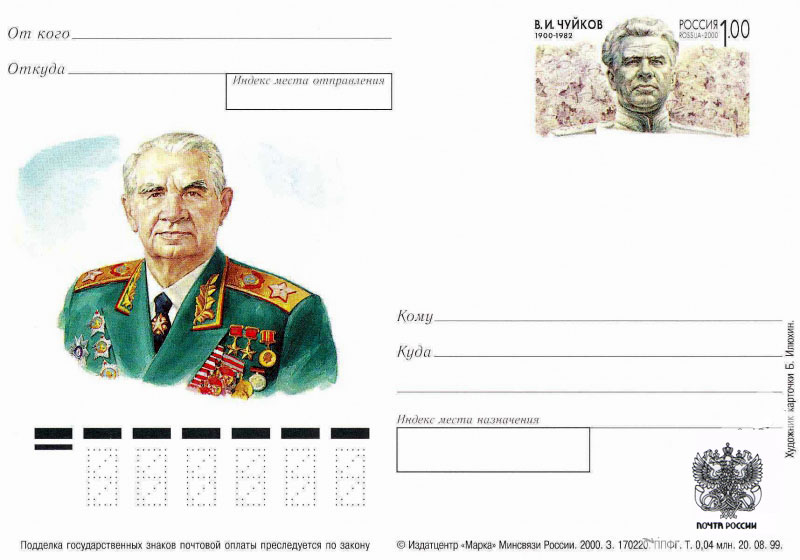 Почтовая карточка, выпущенная к 100-летию маршала Советского Союза, дважды Героя Советского Союза Василия Ивановича Чуйкова